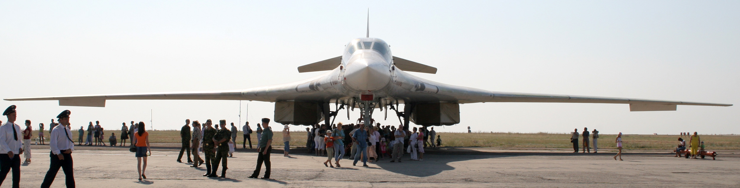 Самолёт Ту-160 бортовой номер 02 «Василий Решетников» на авиабазе Энгельс